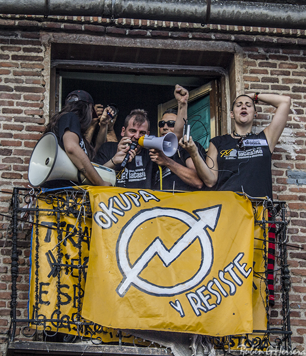 La Casika en 2012. Fuente